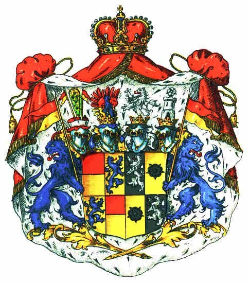 Wappen der Fürsten und Grafen zu Solms-Baruth